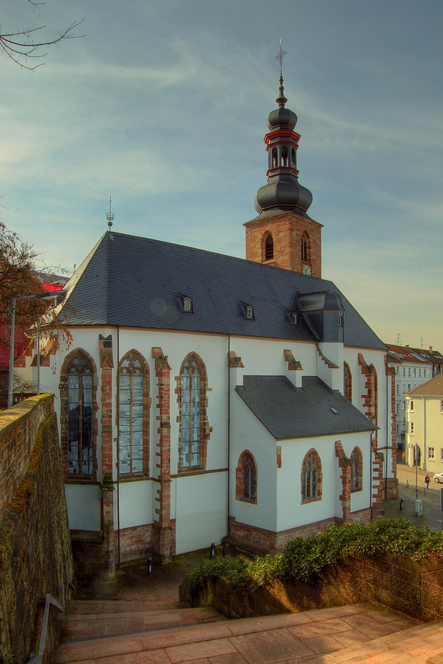 Die Schlosskirche in Saarbrücken.